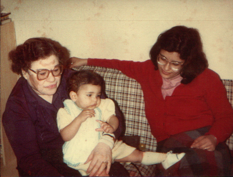 Me , mama, and setu